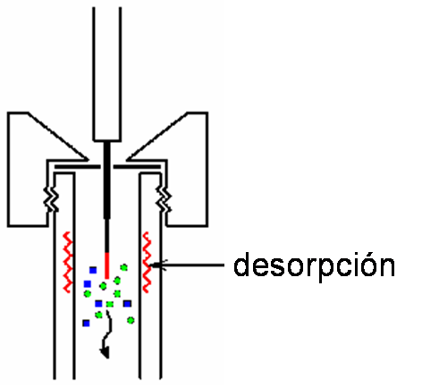 Autor: Keen Fecha: 27.06.05